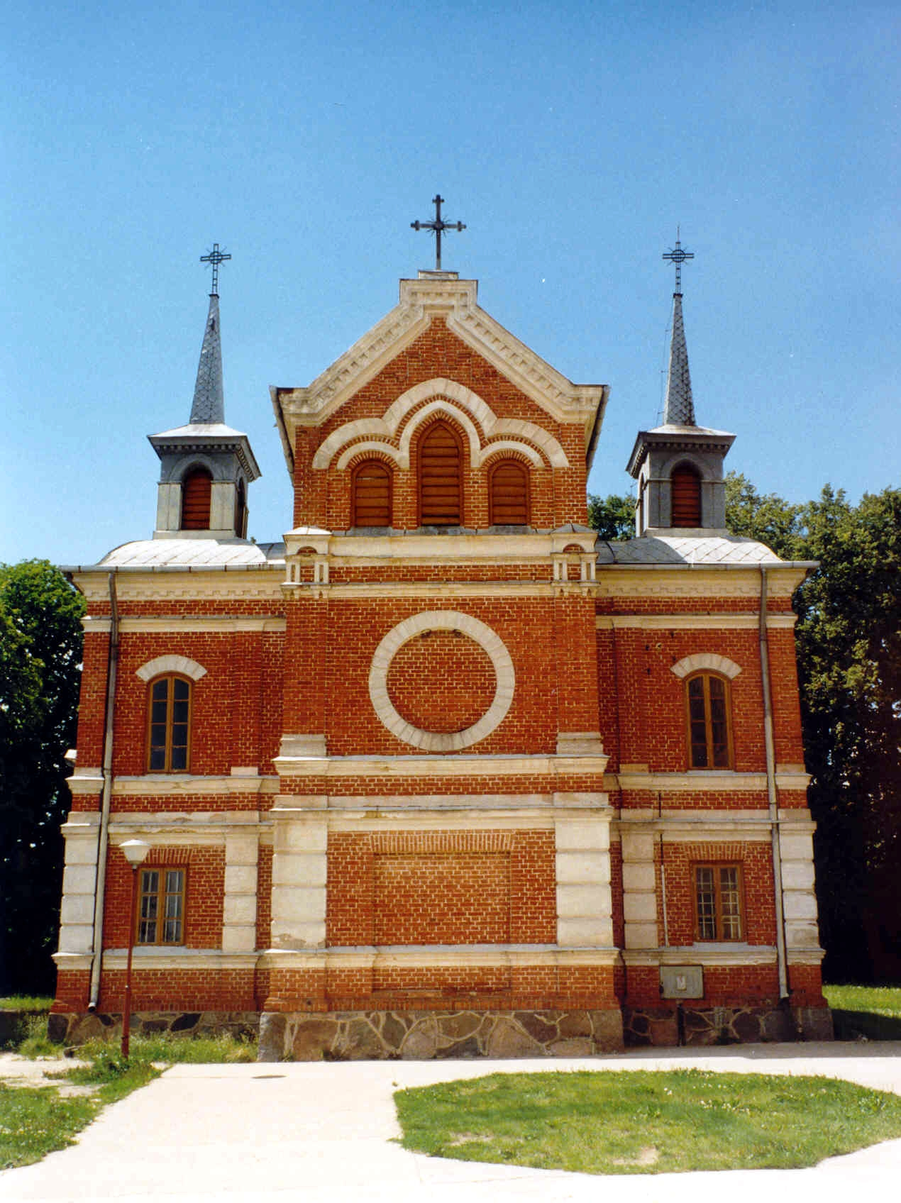 Hadynów, zespół kościoła par. pw. św. Jana Chrzciciela, XVIII, XIX